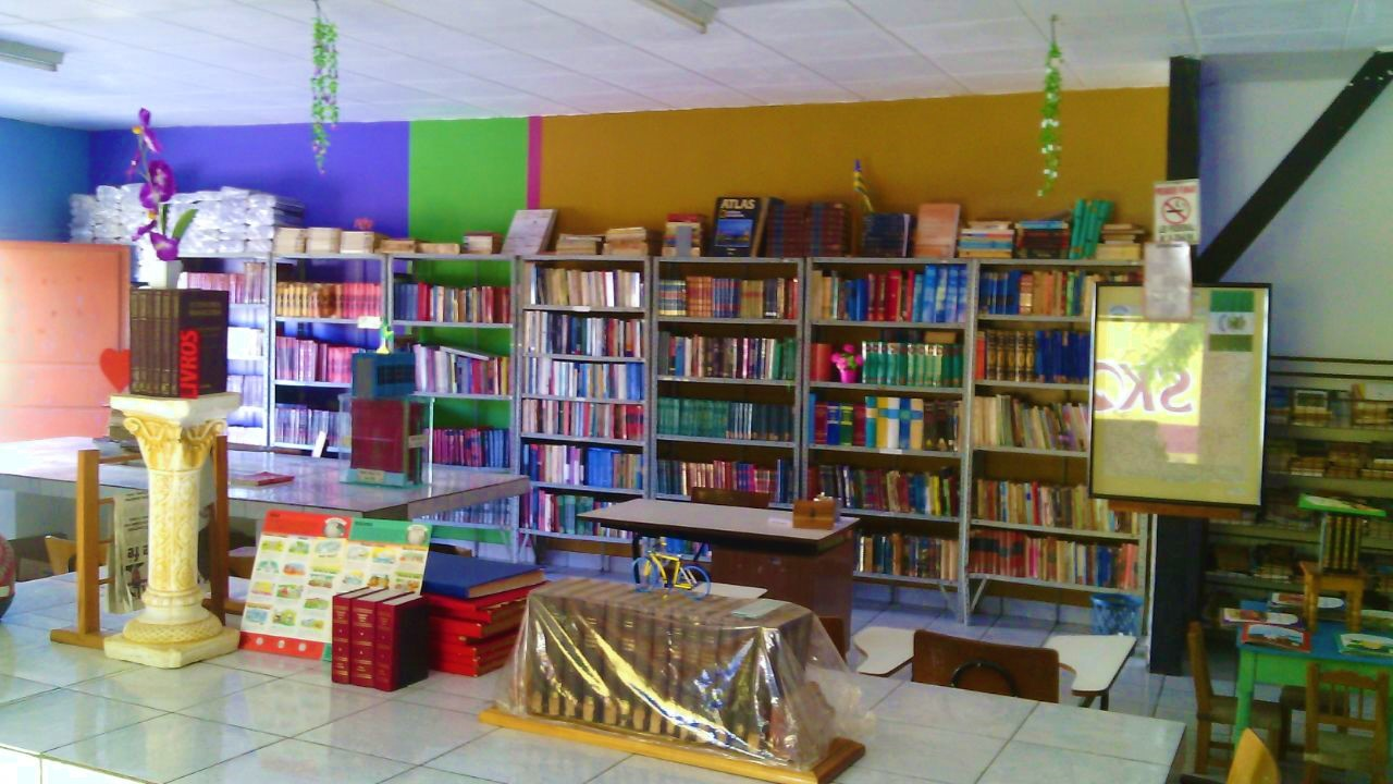 Detalhe do interior da Biblioteca Pública de Campo Maior, no Piauí.